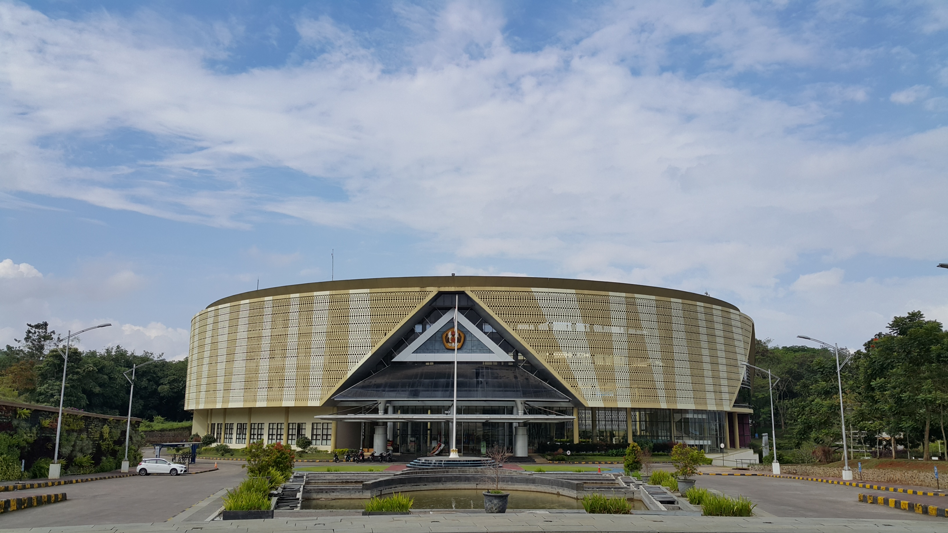 Rektorat Universitas Padjadjaran, Kampus Jatinangor